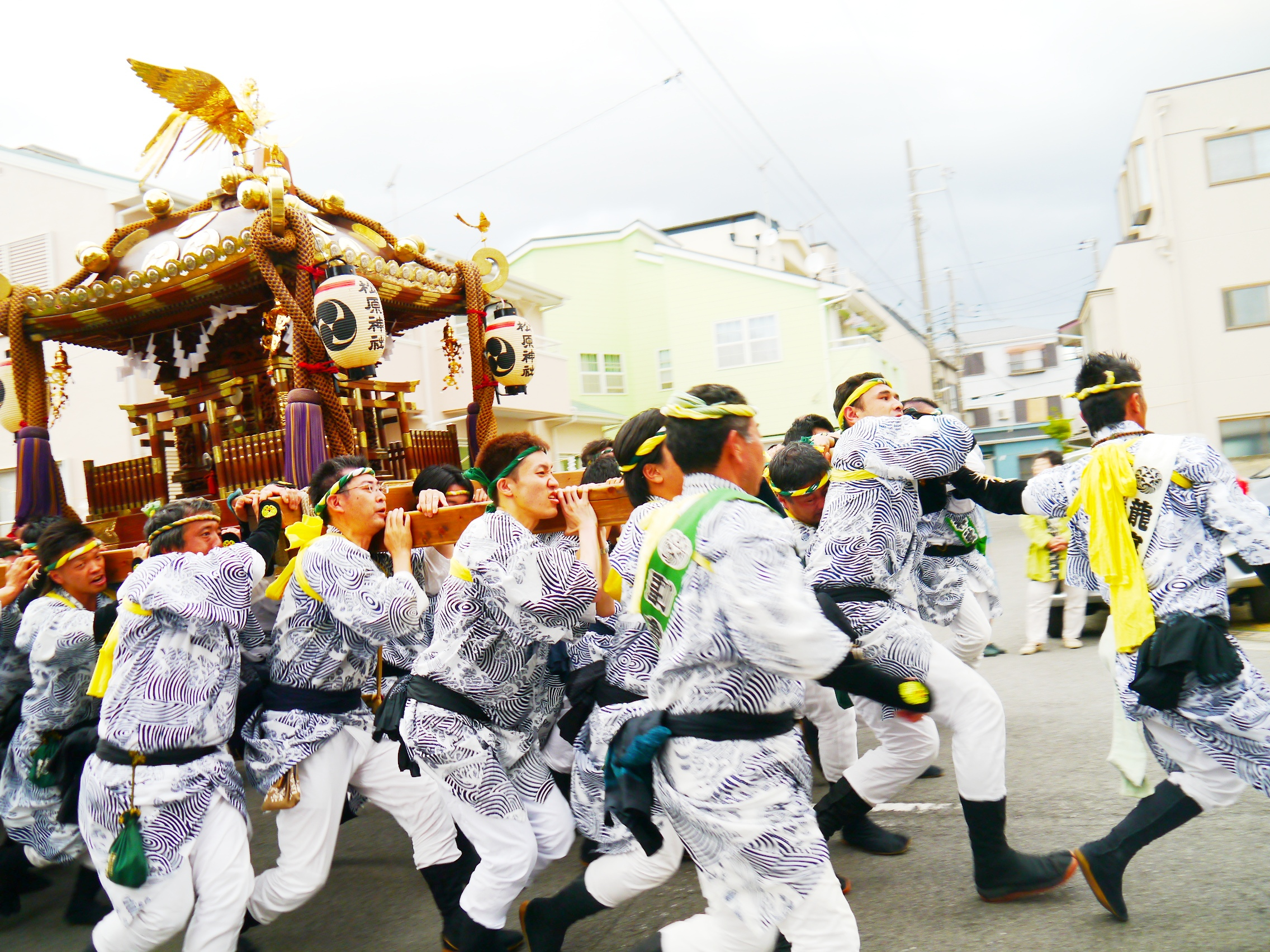 古新宿の御旅所まで突っ駆ける松原本社神輿。